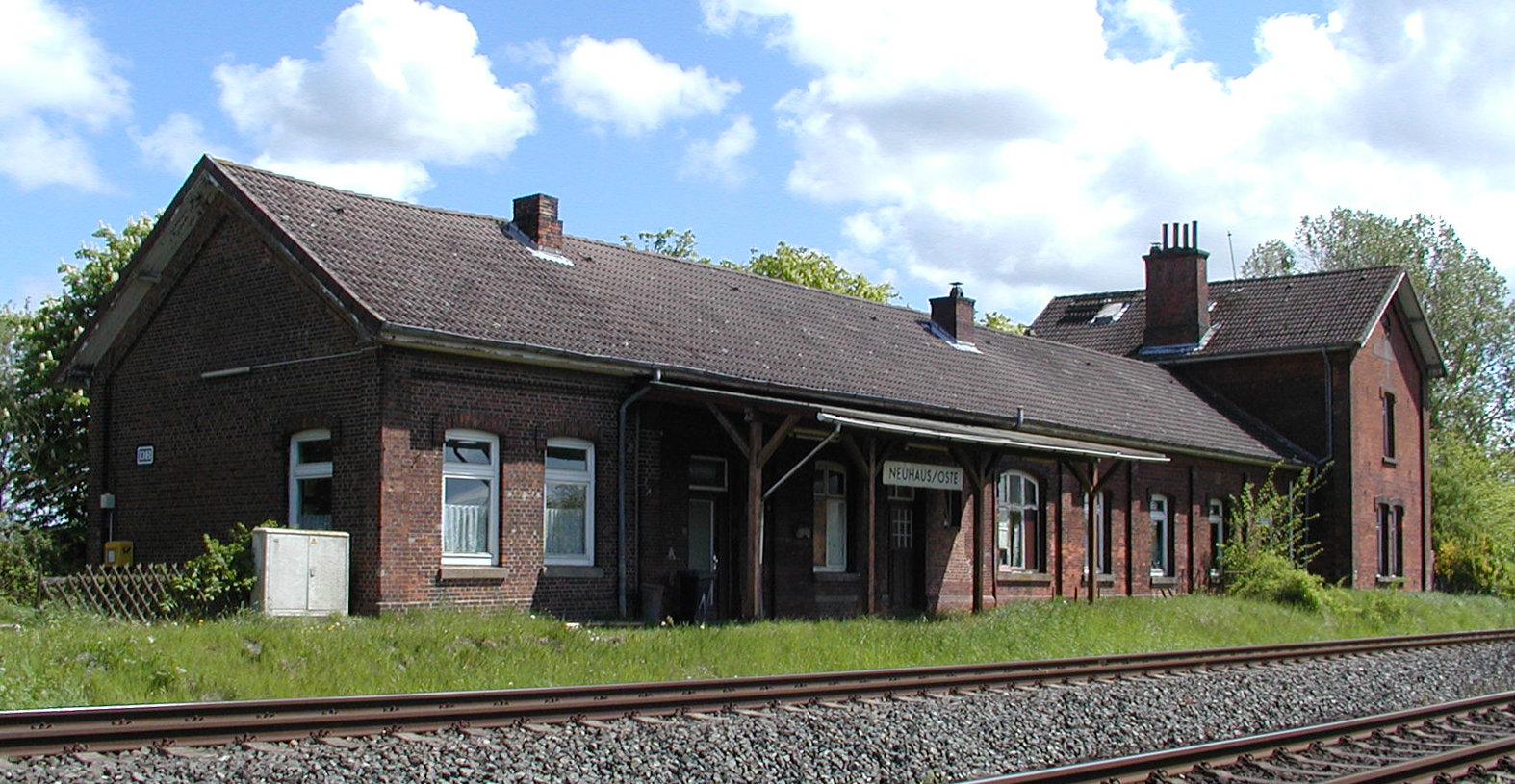 Der alte Bahnhof in Neuhaus (Oste)